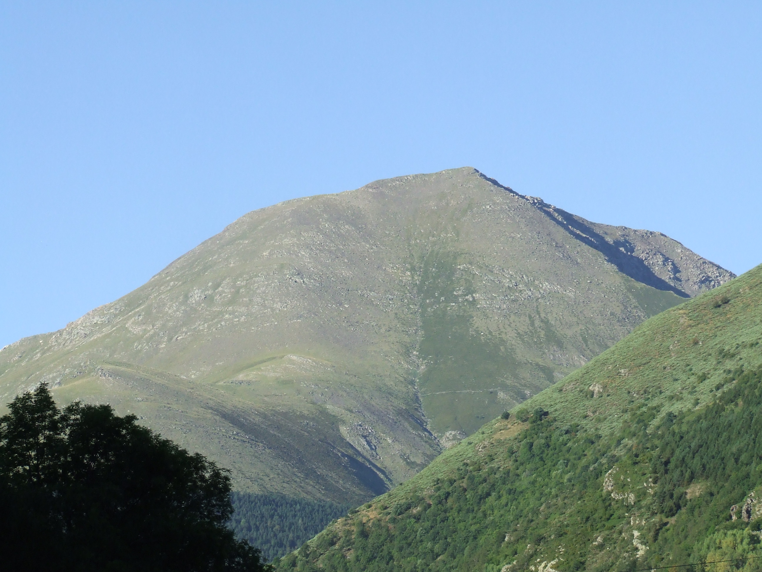 El Bony d'Altars (la Torre de Cabdella, Pallars Jussà)